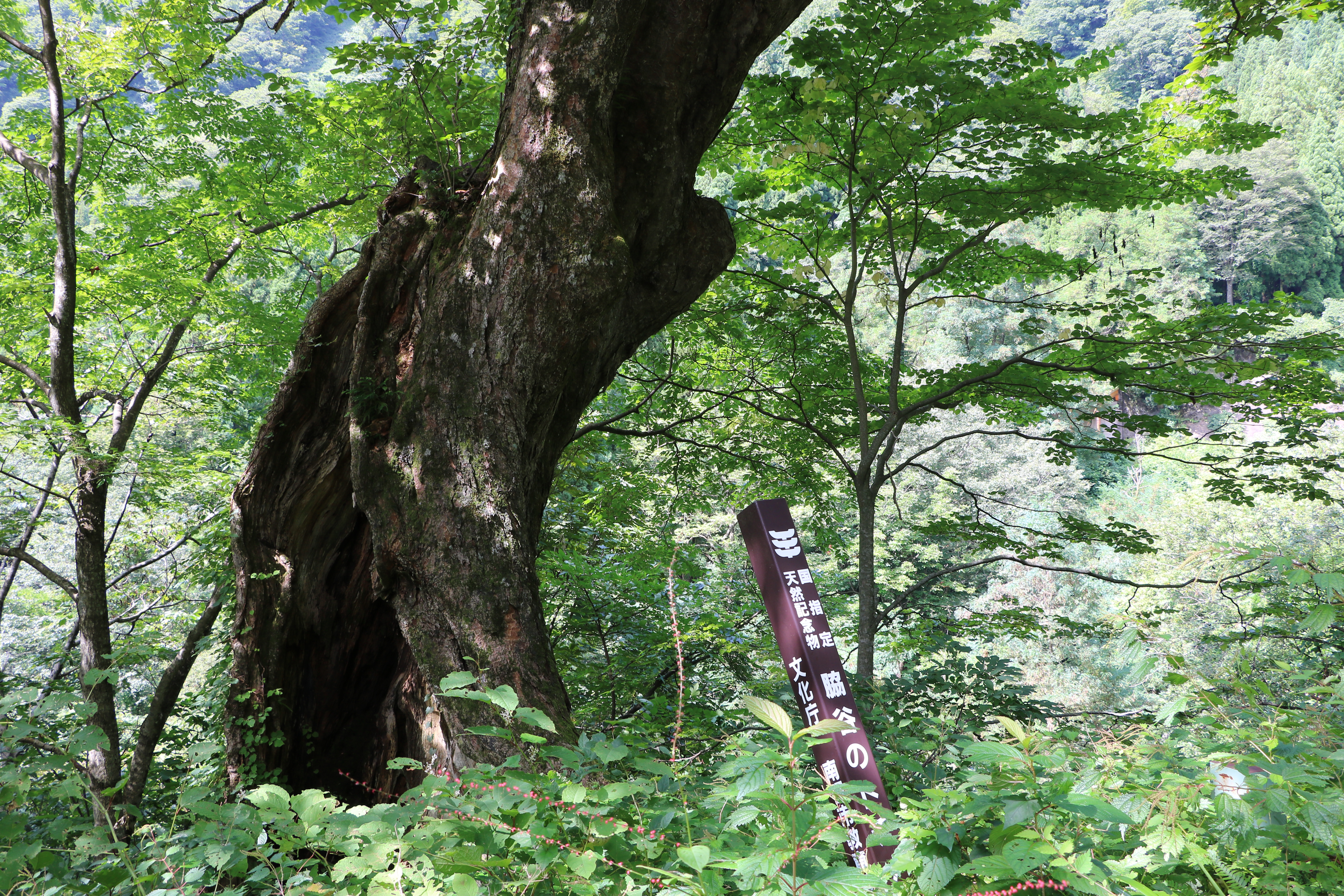 国指定天然記念物 脇谷のトチノキ（富山県南砺市利賀村）